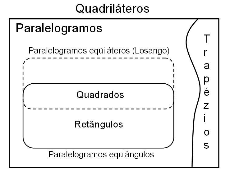 Paralelogramos